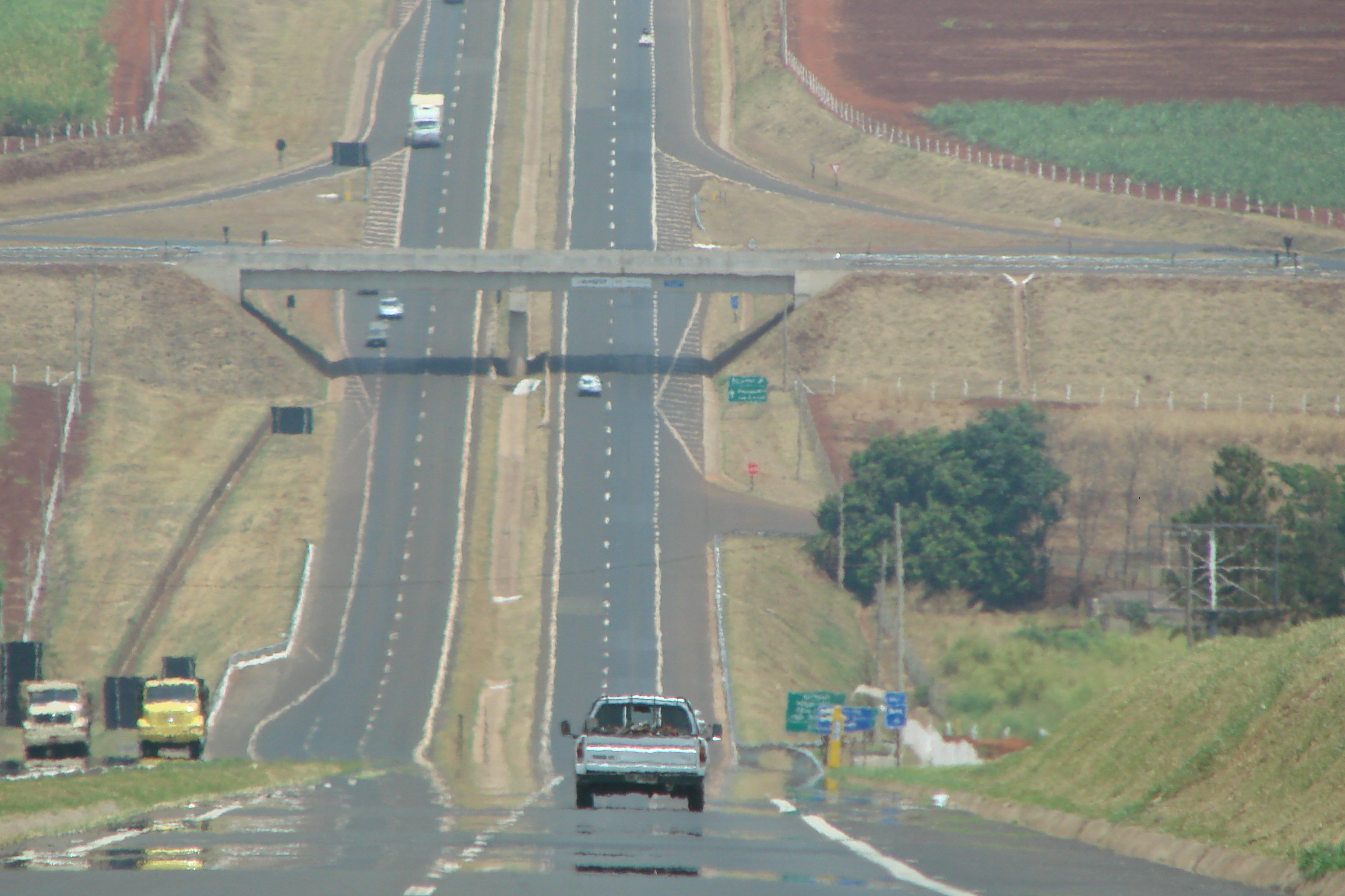 Foto da SP-255 Antonio Machado Sant'Anna sentido Sul na altura do Km 5